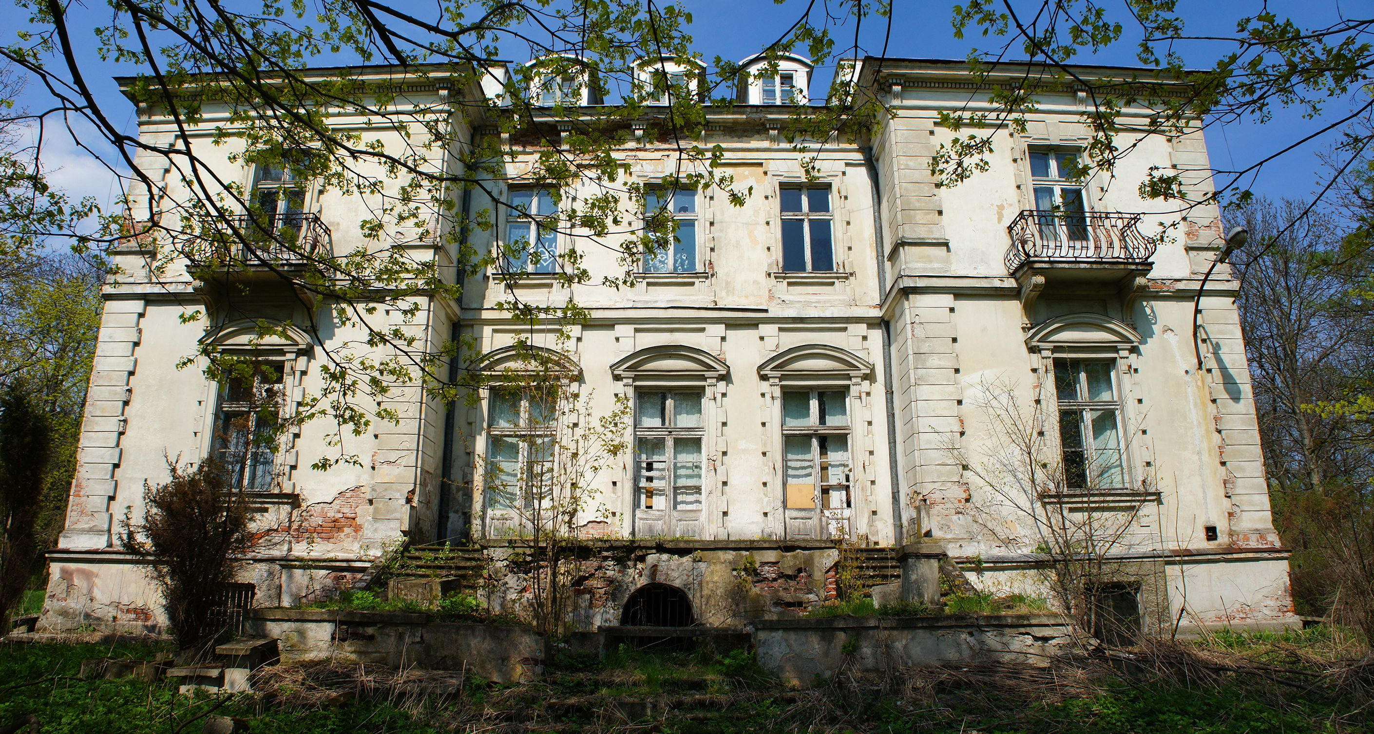 Kołbiel-Stara Wieś - pałac, 1866-1878